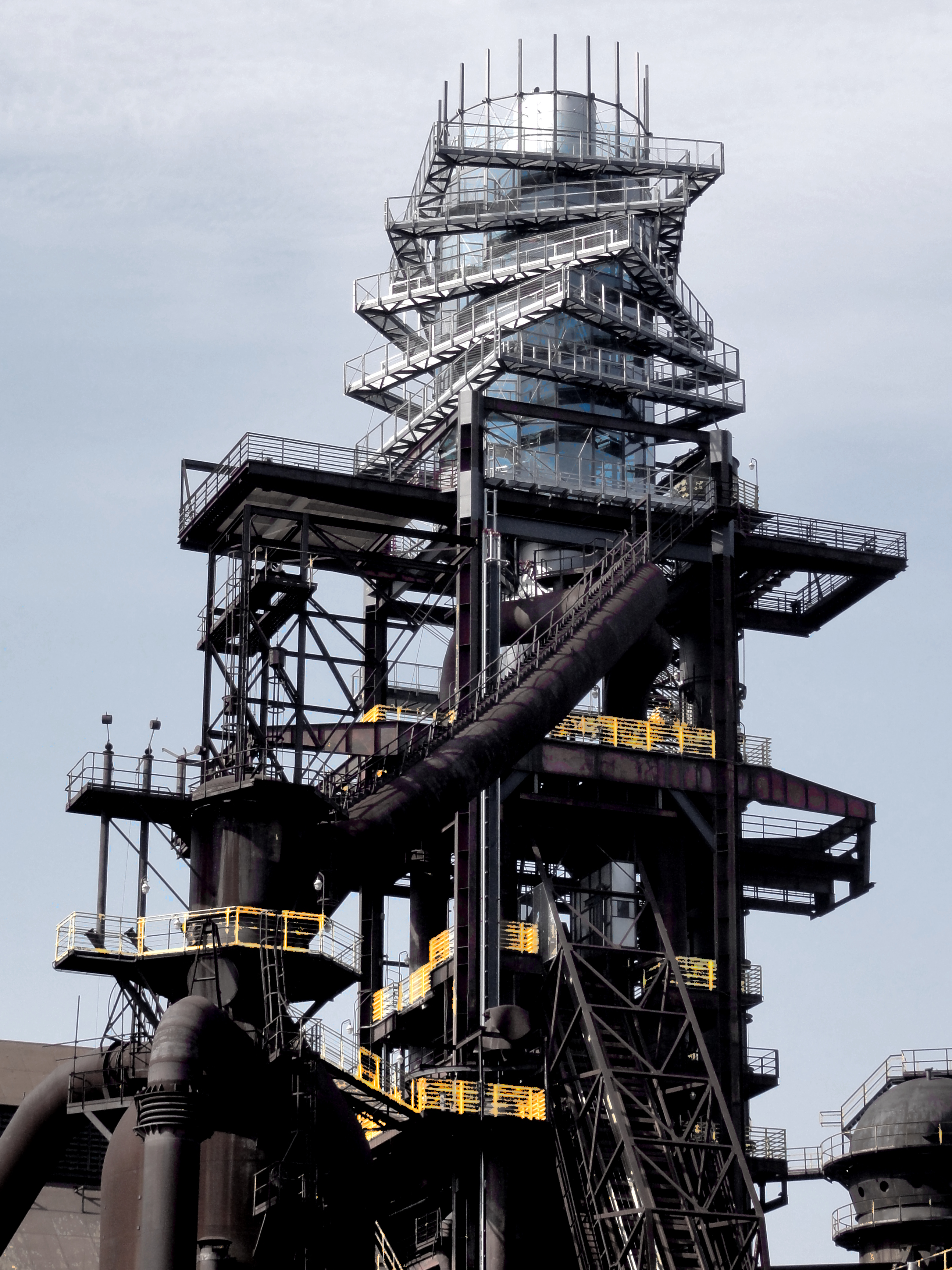 Dolní Vítkovice, Bolt Tower, Česká republika, 2015